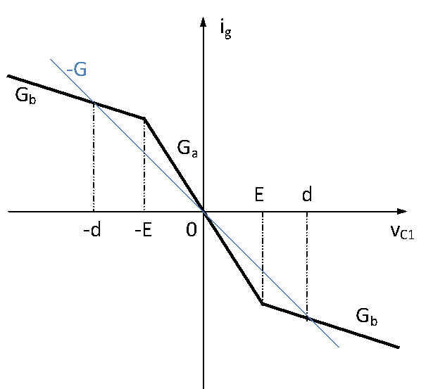 Вольт - амперная характеристика диода Чуа. Представляет собой нелинейное отрицательное сопротивление